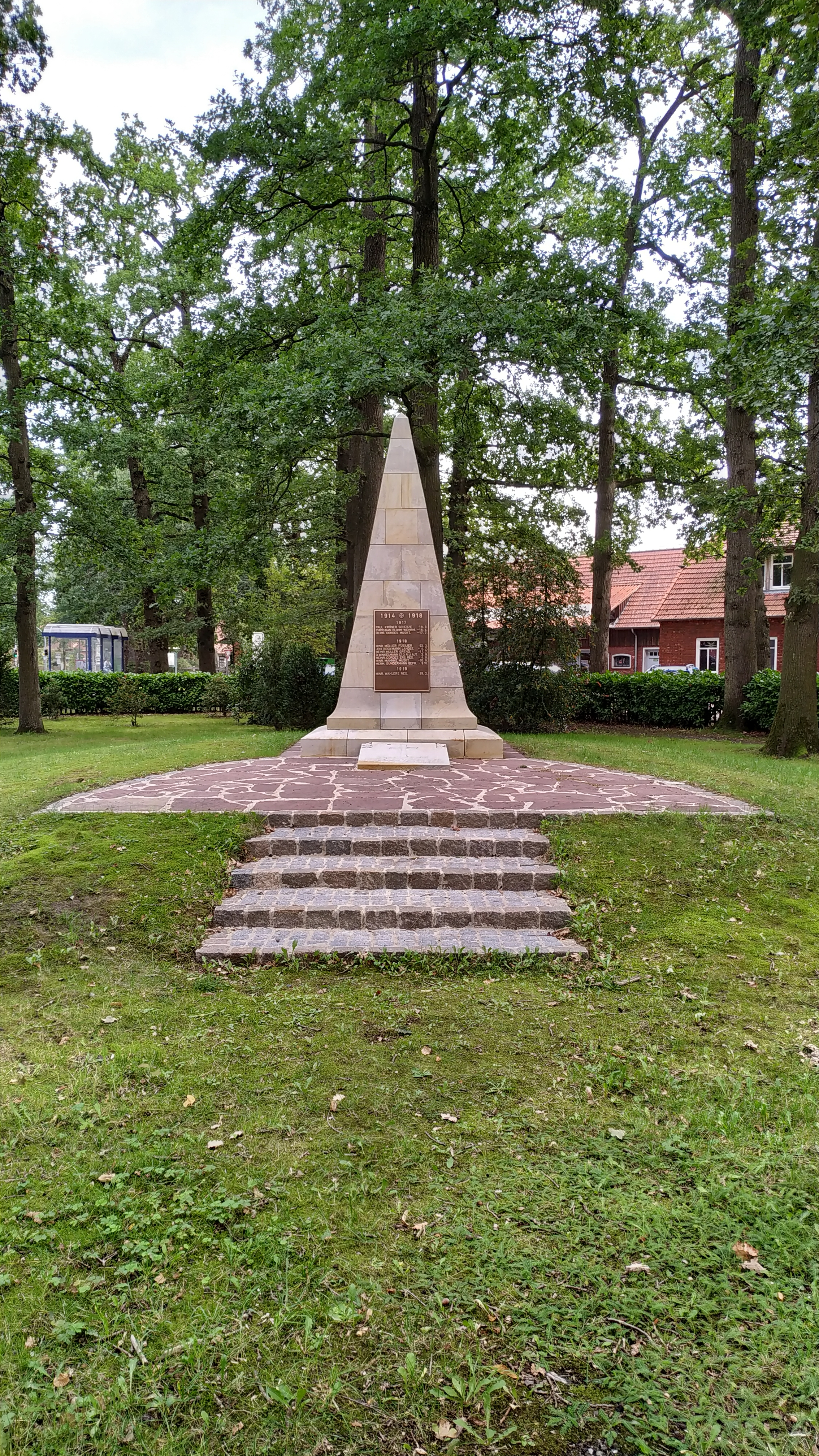 Kriegerdenkmal Fischerhude Gesamtansicht